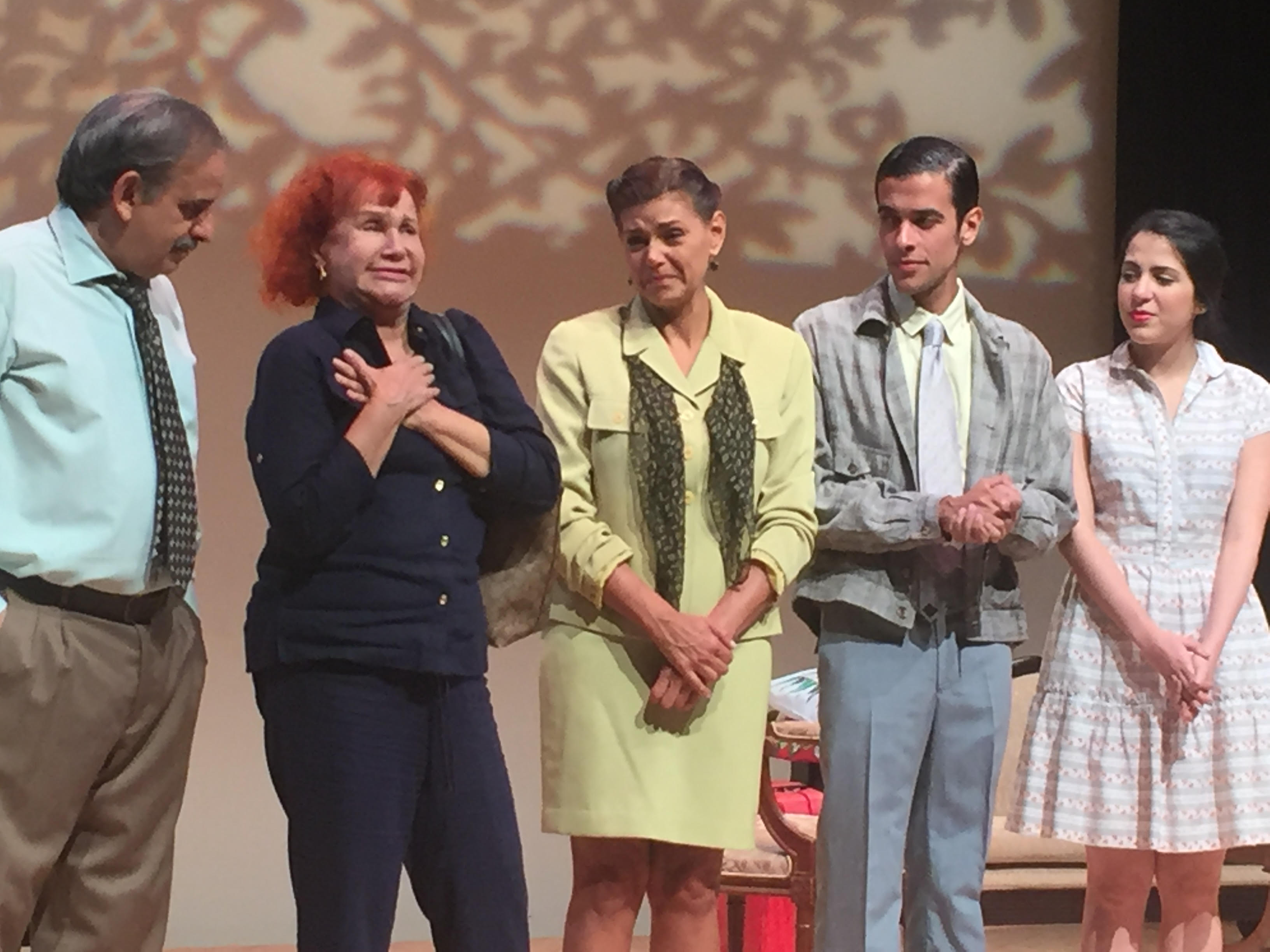 La actriz venezolana Tania Sarabia junto al Grupo Actoral 80.